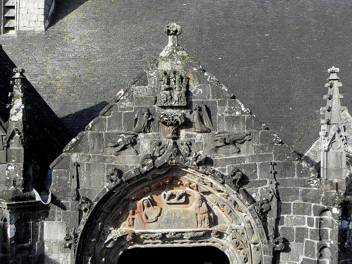 Porche sud de l'église Saint-Salomon de La Martyre (29). Tympan et pignon.